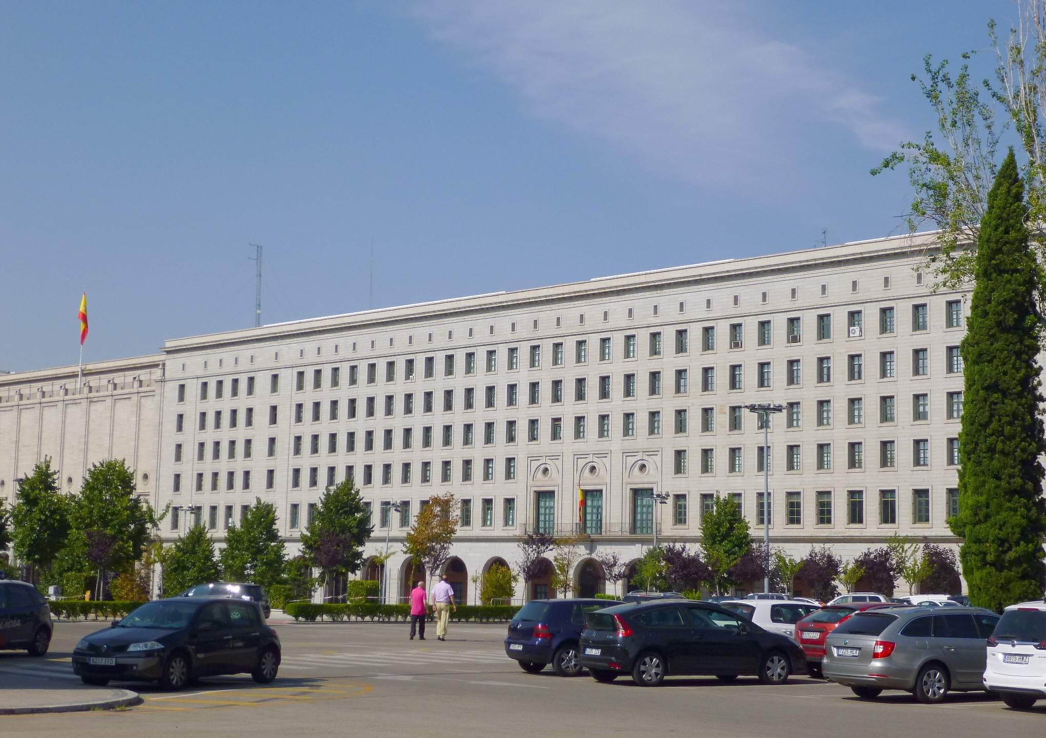 Nuevos Ministerios (Madrid)